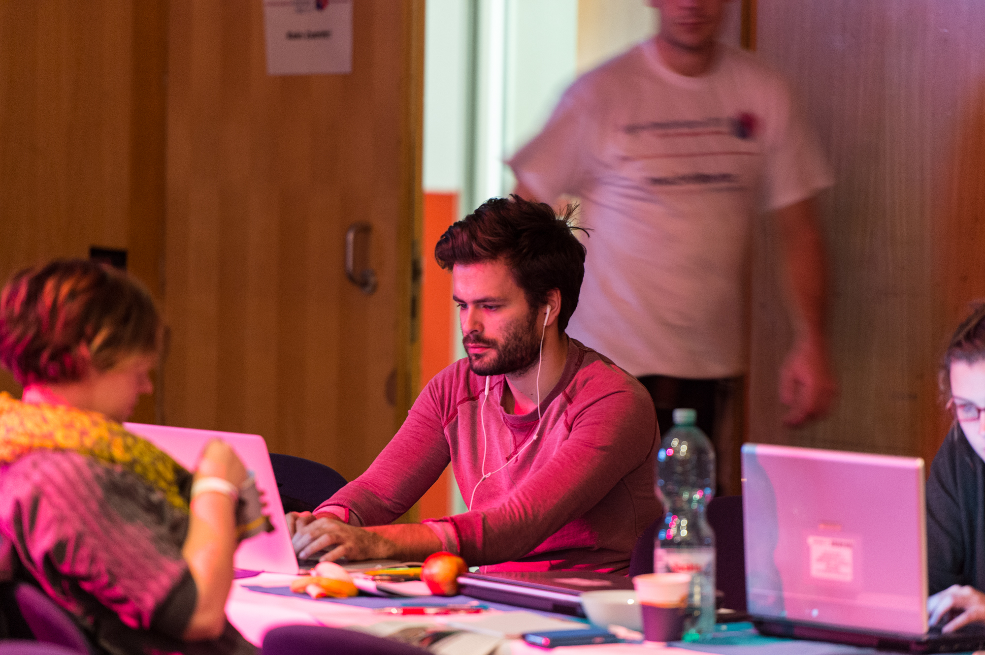 Tilo Jung (Jung & Naiv) hinter den Kulissen der Jugendmedientage. Foto: Fabian Jäger